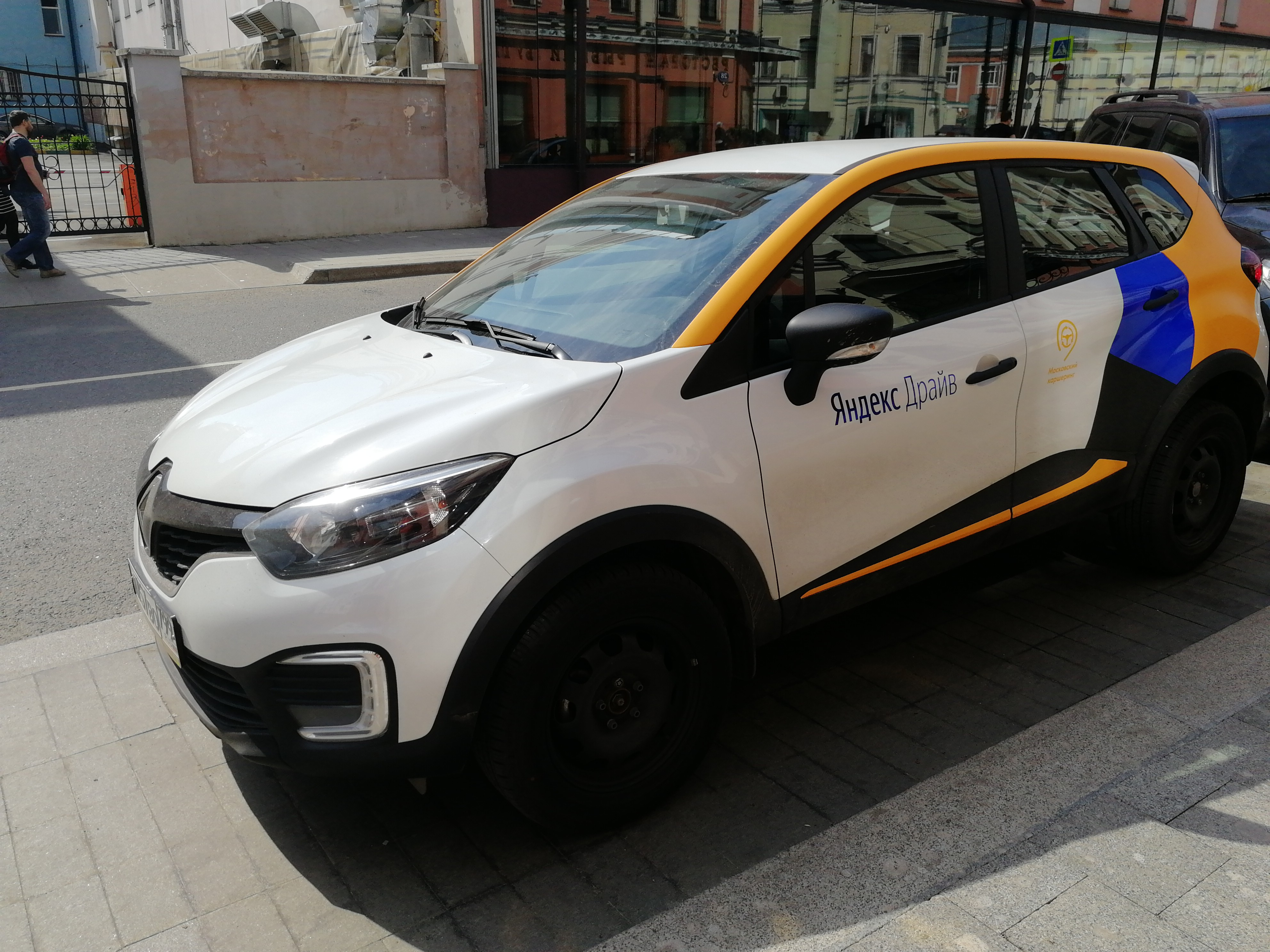 Renault Kaptur. Yandex.Drive